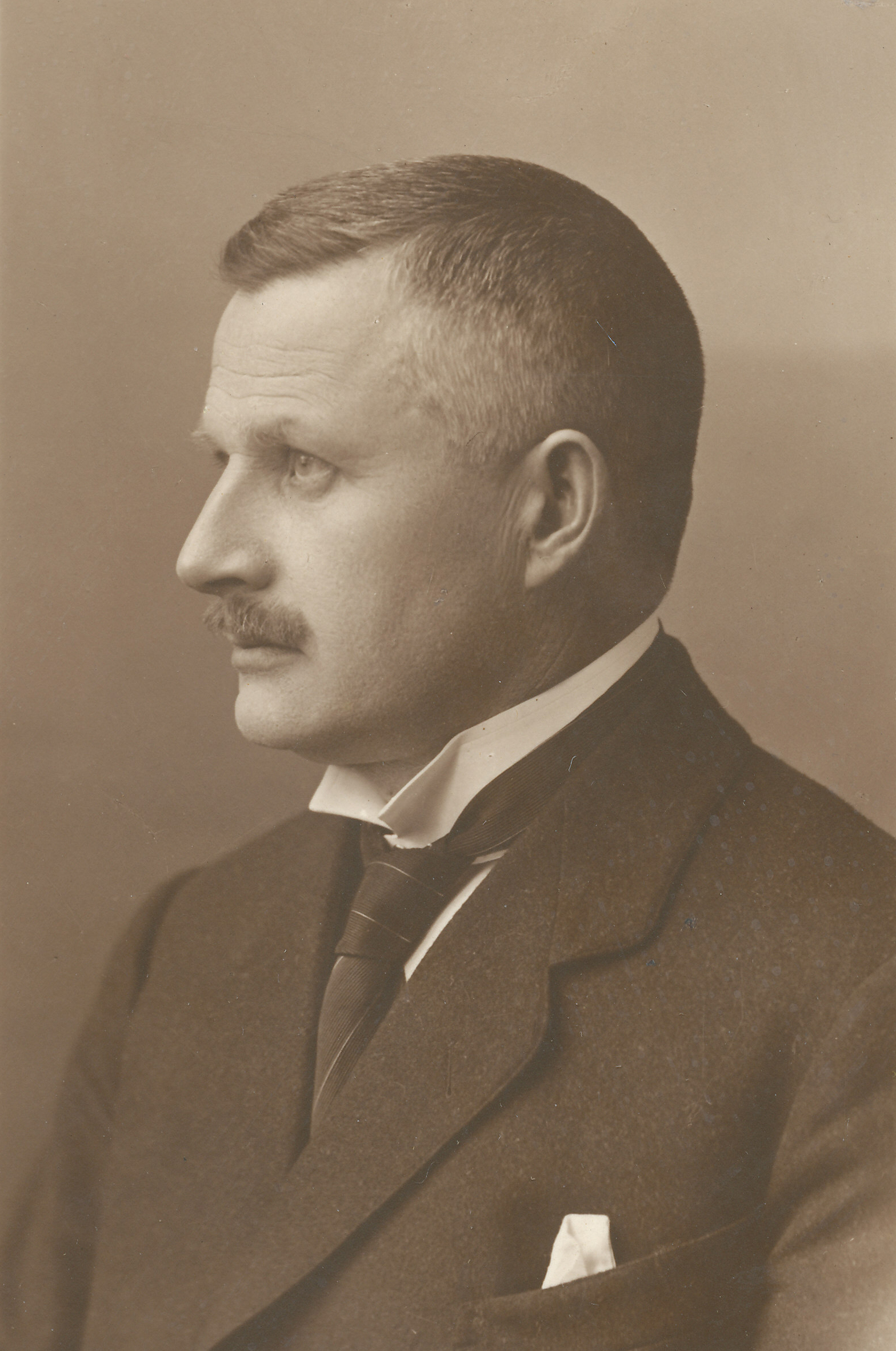 Format: Fotopositiv Dato / Date: ca. 1930 Fotograf / Photographer: Ukjent Sted / Place: Trondheim Hvem er hvem? (1930): Peder Konrad Hustad (f. 1878) Wikipedia: Leinstrand Digitalarkivet: Peder Konrad Hustads husstand på Mære gård i Sparbu (Folketellingen 1910) Eier / Owner Institution: Trondheim byarkiv, The Municipal Archives of Trondheim Arkivreferanse / Archive reference: Tor.H41.B25.F1715 Merknad: Formann for Trøndelagsutstillingens fagavdeling VIII; Landutstilling for maskiner for land- hage- og meieribruk. HUSTAD Peder Konrad, landbrukssk-bestyrer, Heimdal, f. 5. april 1878 i Inderøy, sønn av gårdbr. Tørris Olsen H. og Karoline Emilie Bragstad. Gift 1909 Elisabeth Holst, f. 25. juli 1877, dtr. av distriktslæge i Sør-Fron Johan Fredrik H. og Marie Boeck. Amtssk. 1895, Mære landbrukssk. 1898, Norges landbrukshøisk. 1900, landbr.lærer 1900, landbrukssk.best. fra 1918. Utgitt lærebok i kjemi, samt en del mindre arbeider. Sekr. i Nord-Trøndelag landbruksselsk. 1909—18, ordf. i Leinstrand 1929 m. m.